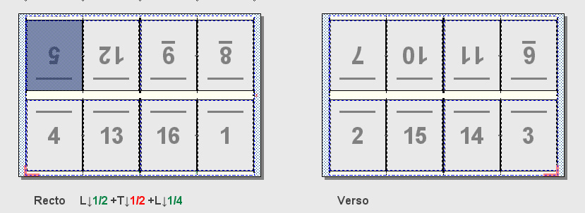 Gabarit d'imposition 8 poses Copie d'écran réalisée par ©éréales Kille® ✉ ☺.